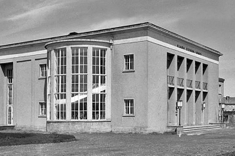 Das Kulturhaus Clara Zetkin in Espenhain